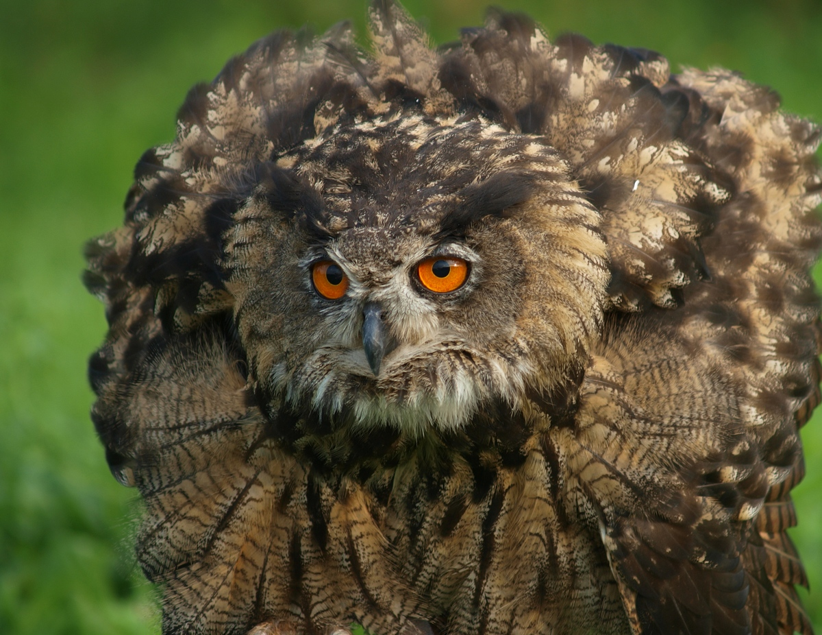 Puchacz w pozycji obronnej